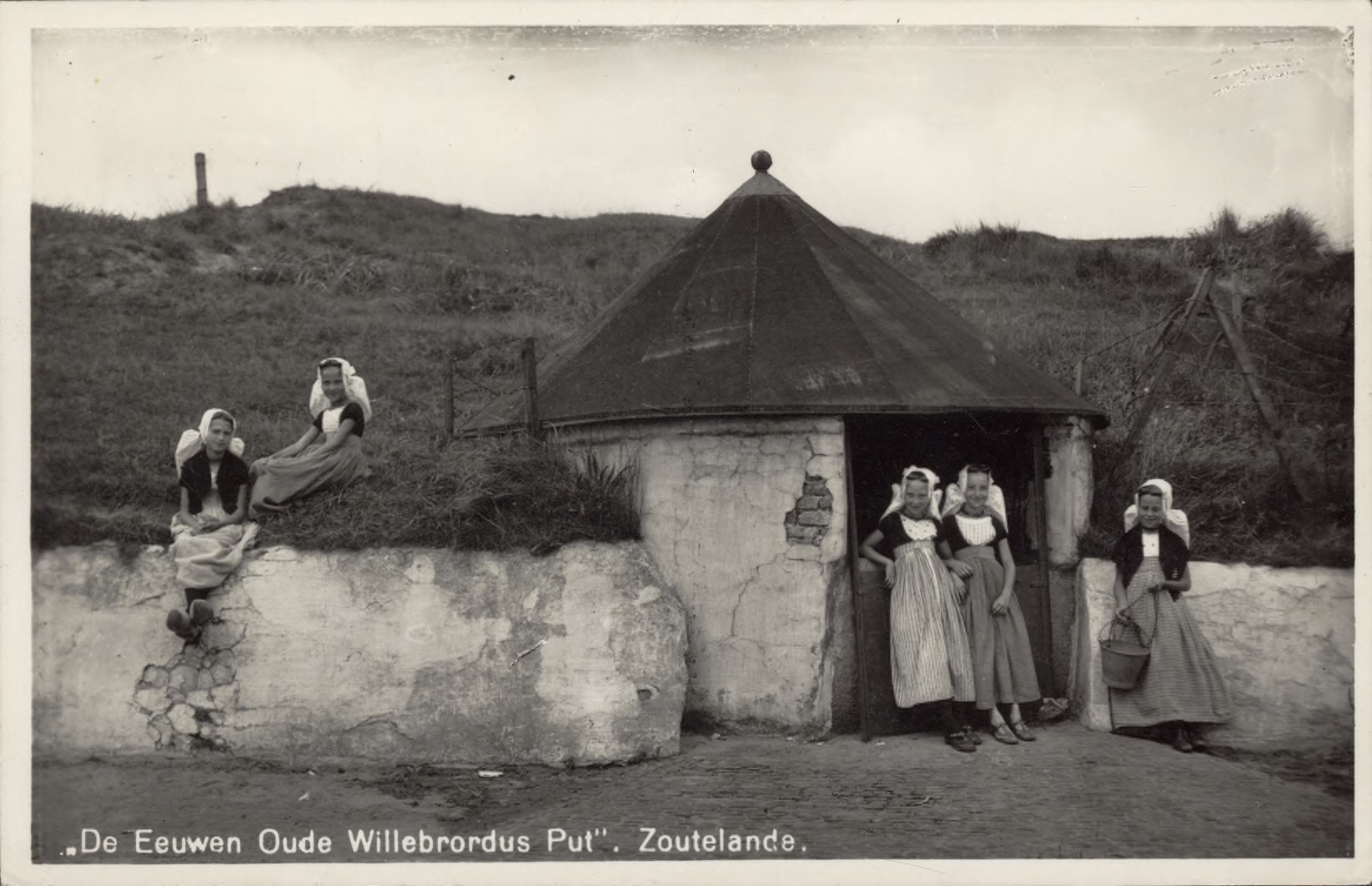 De Willibrordusput te Zoutelande met meisjes in Walcherse klederdracht. prentbriefkaart "De Eeuwen Oude Willebrordus Put", Zoutelande Zeeuws Archief, Zeeuws Genootschap, Zelandia Illustrata, Prentbriefkaarten, nr 10003